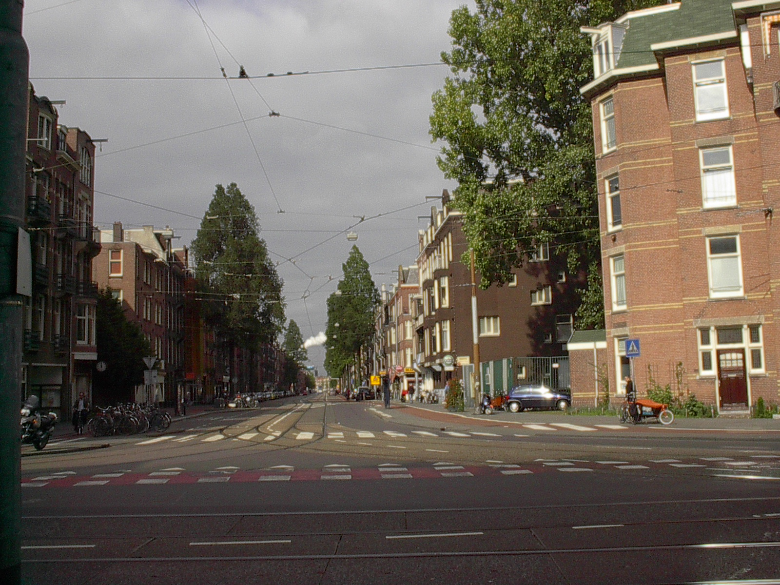 Admiraal de Ruyterweg, Amsterdam